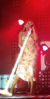 В Кирилловке